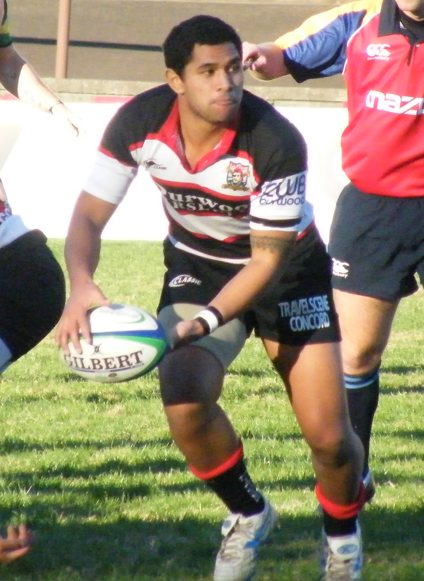 Jeremy sua